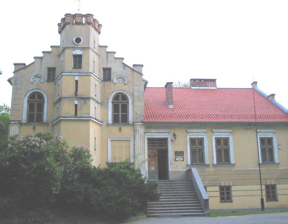 Skawina, ul. Adama Mickiewicza 7 - budynek Towarzystwa Gimnastycznego „Sokół” (Pałacyk "Sokół"), obecnie "Centrum Kultury i Sportu w Skawinie"